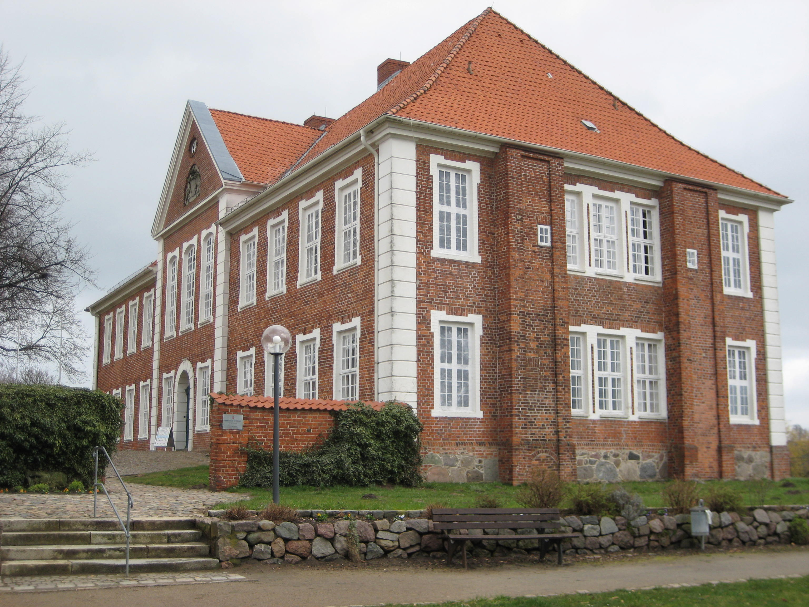 Ehemaliges Herrenhaus in Ratzeburg jetzt Kreismuseum